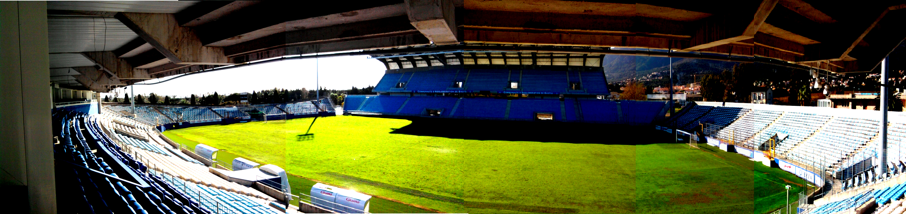 Tribune Est Petrignani (Gauche), Tribune Sud Lorenzi (Centre), Tribune Ouest Cahuzac (Droite)